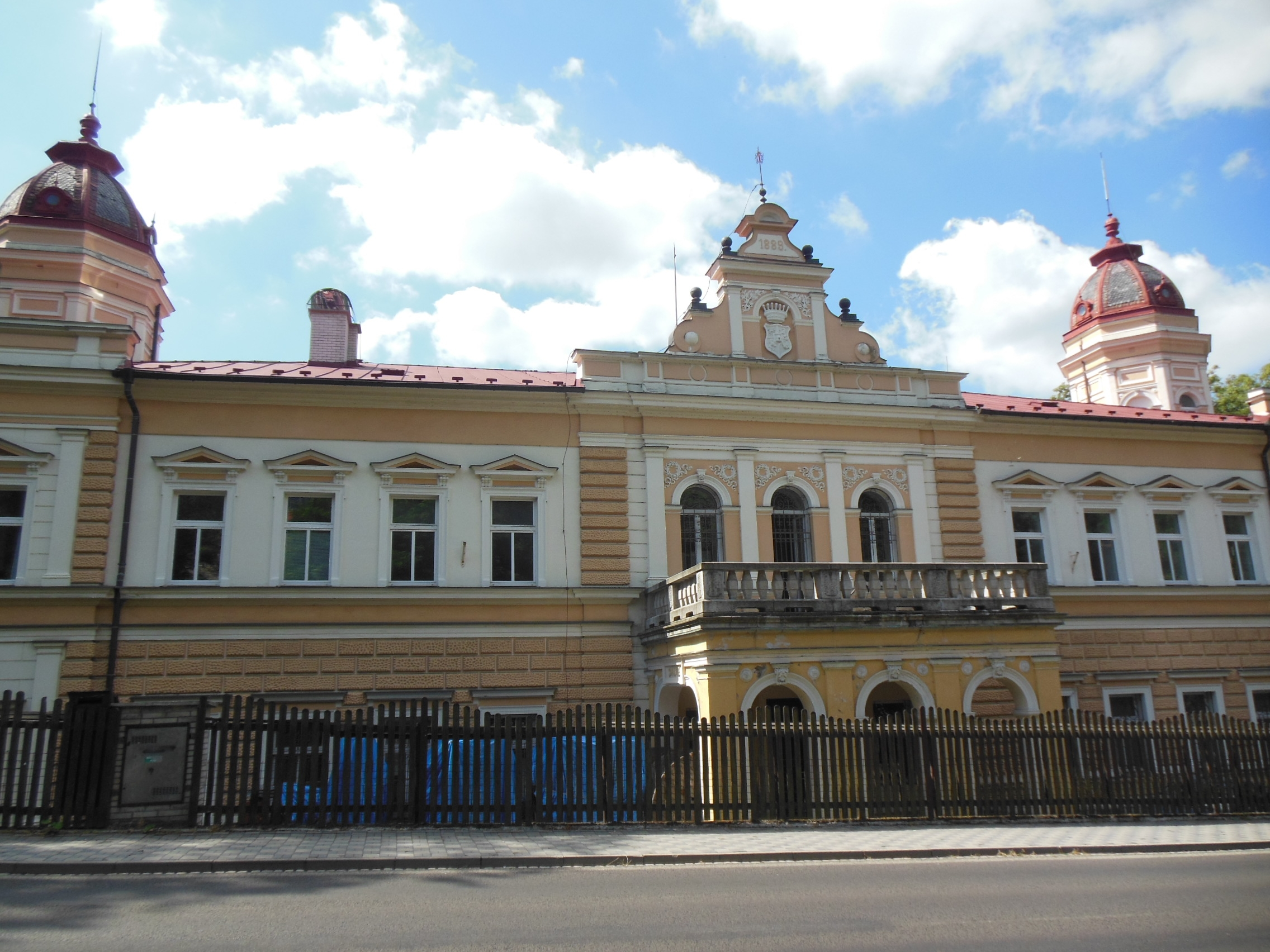 Zámek v ulici Karlovarská v Nejdku (okres Karlovy Vary).